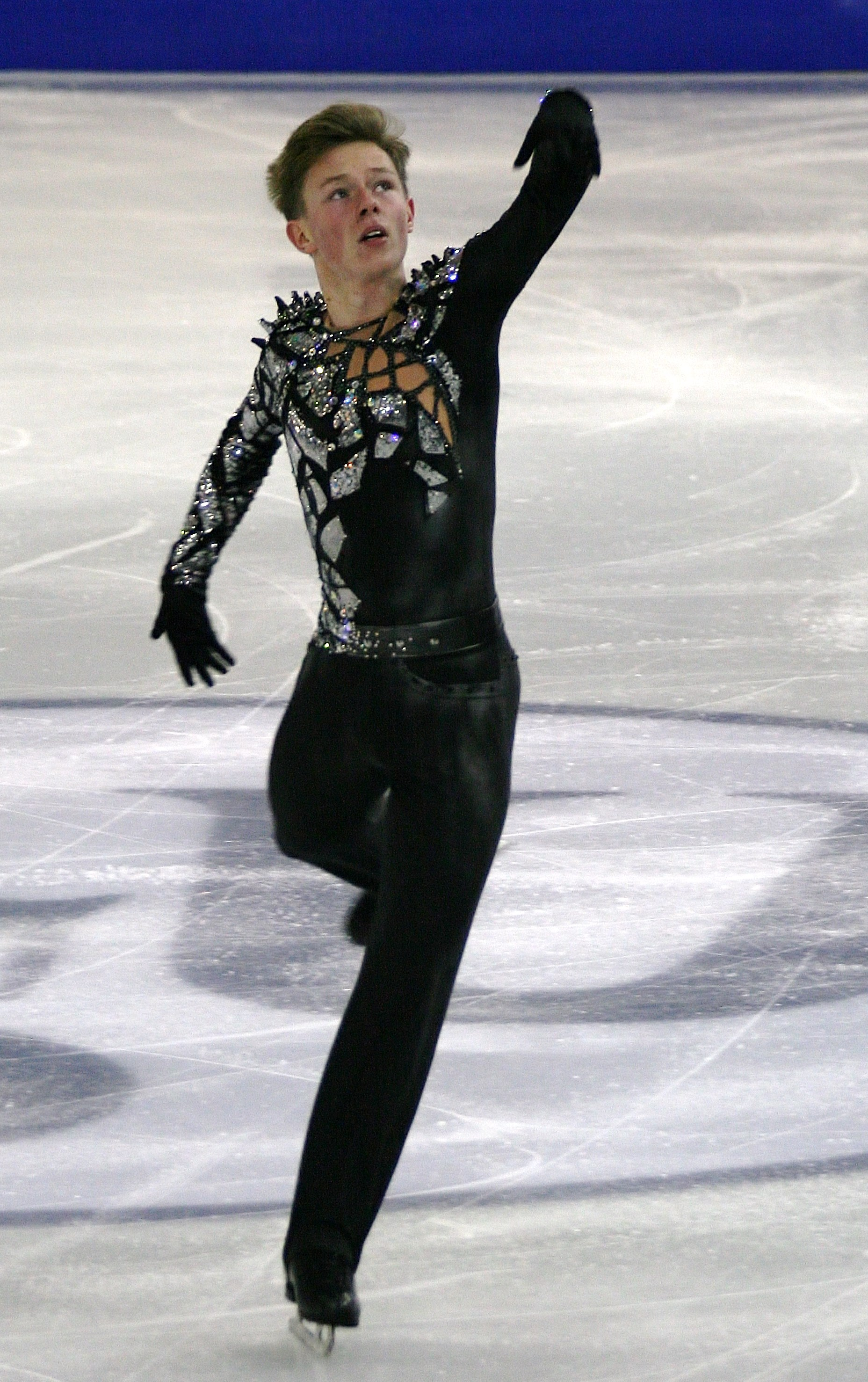 Александр Петров (Россия) на финале Гран-при среди юниоров 2014-2015.